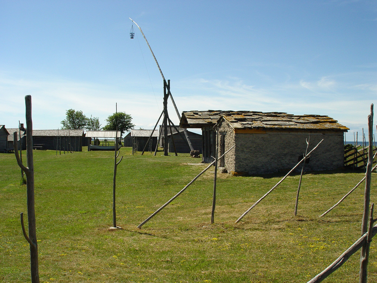 Fischerstelle auf Gotland: Fischerdorf Kovik. Museumsanlage, 4 km nördlich Klintehamn. Hütten und Leuchtfeuer